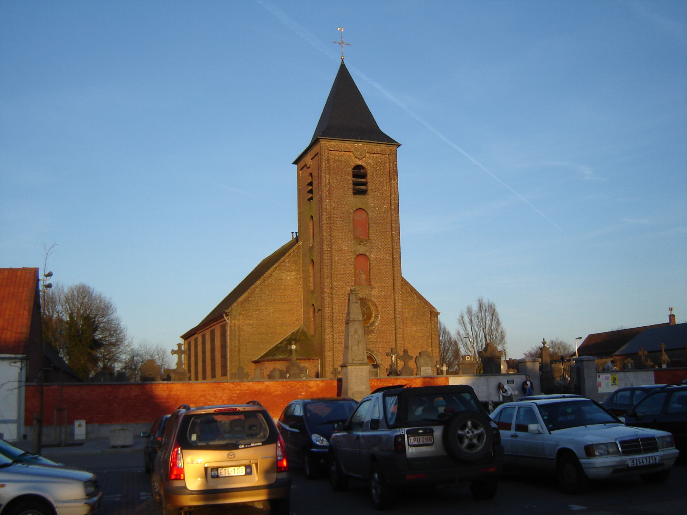 Eglise Saint-Pierre in Rumes, Hainaut, Belgium